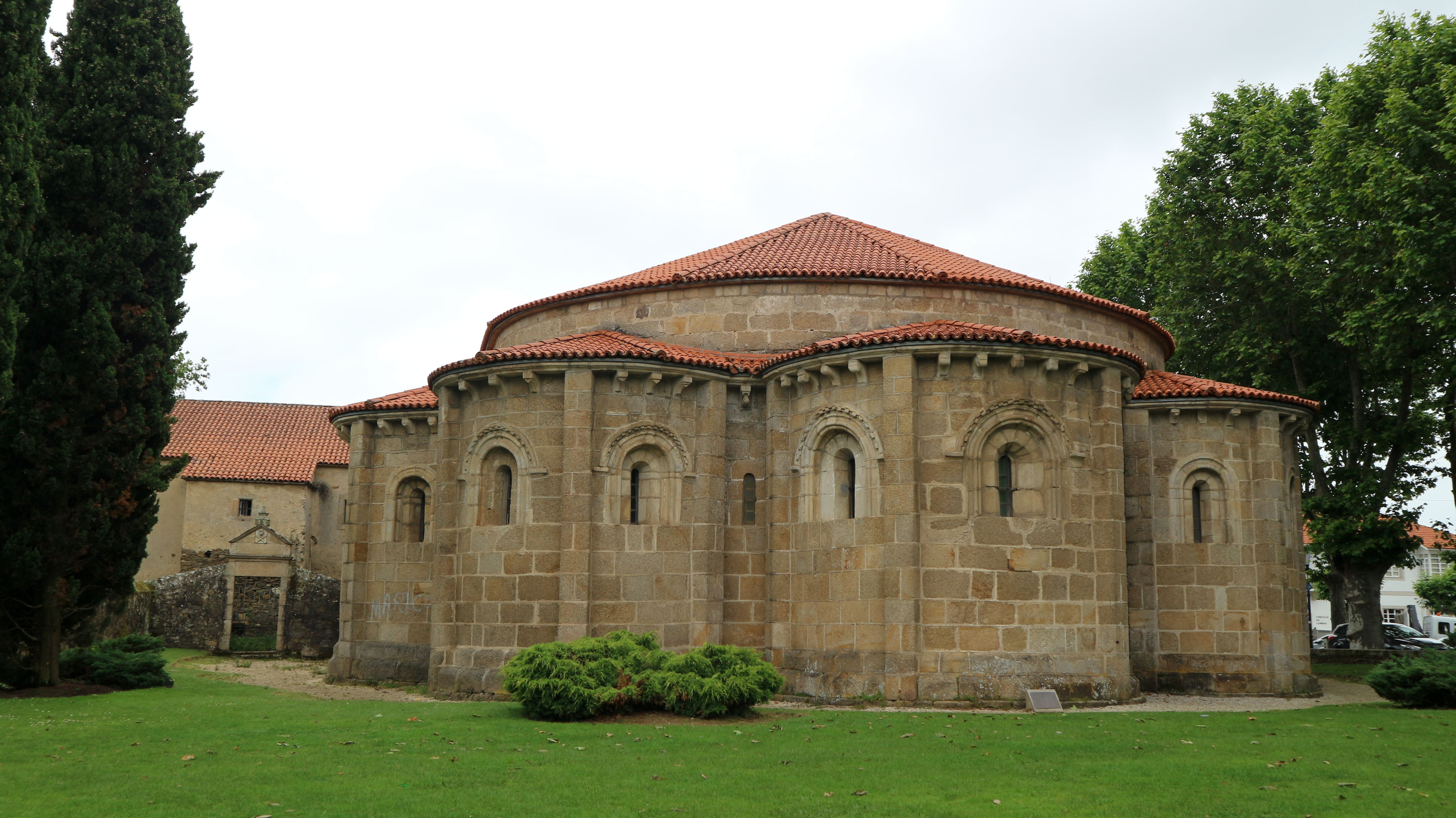 Igrexa de Santa María de Cambre, Cambre. Exterior.